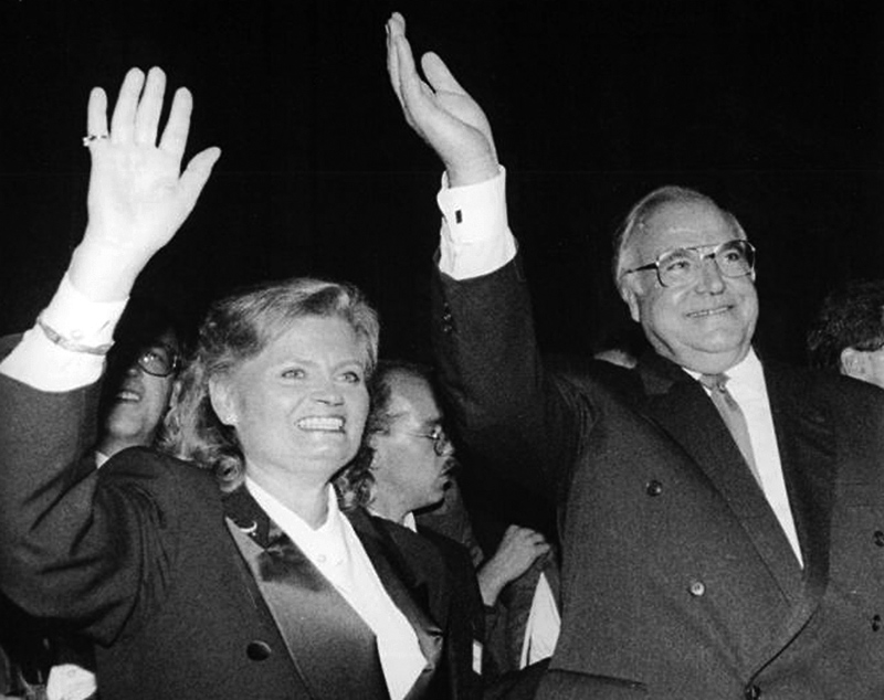 ADN-Peer Grimm-3.10.90 Berlin: Vereinigung. Bundeskanzler Helmut Kohl und seine Frau Hannelore kamen während des Empfangs im Reichstag immer wieder vor das Gebäude, um die neuen Bundesbürger zu begrüßen.